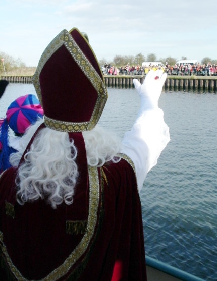 Sinterklaas arriveert in Gennep, eigen foto 2004 (c) Looi